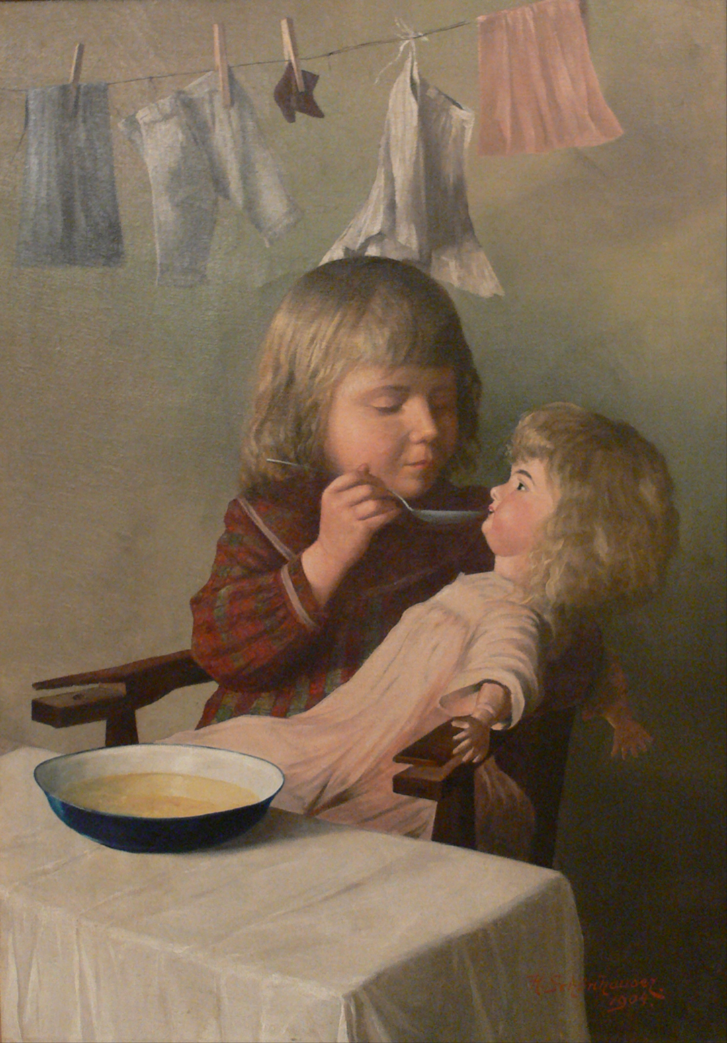 Mädchen mit Puppe, signiert "H. Schönhauser 1904" Wien, Österreichisches Museum für Volkskunde